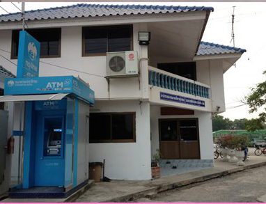 อาคารบ้านพักอาจารย์เวร โรงเรียนสวนกุหลาบวิทยาลัย รังสิต